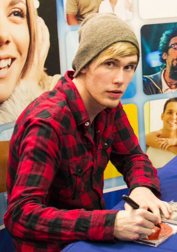 Colton Dixon Meet & Greet